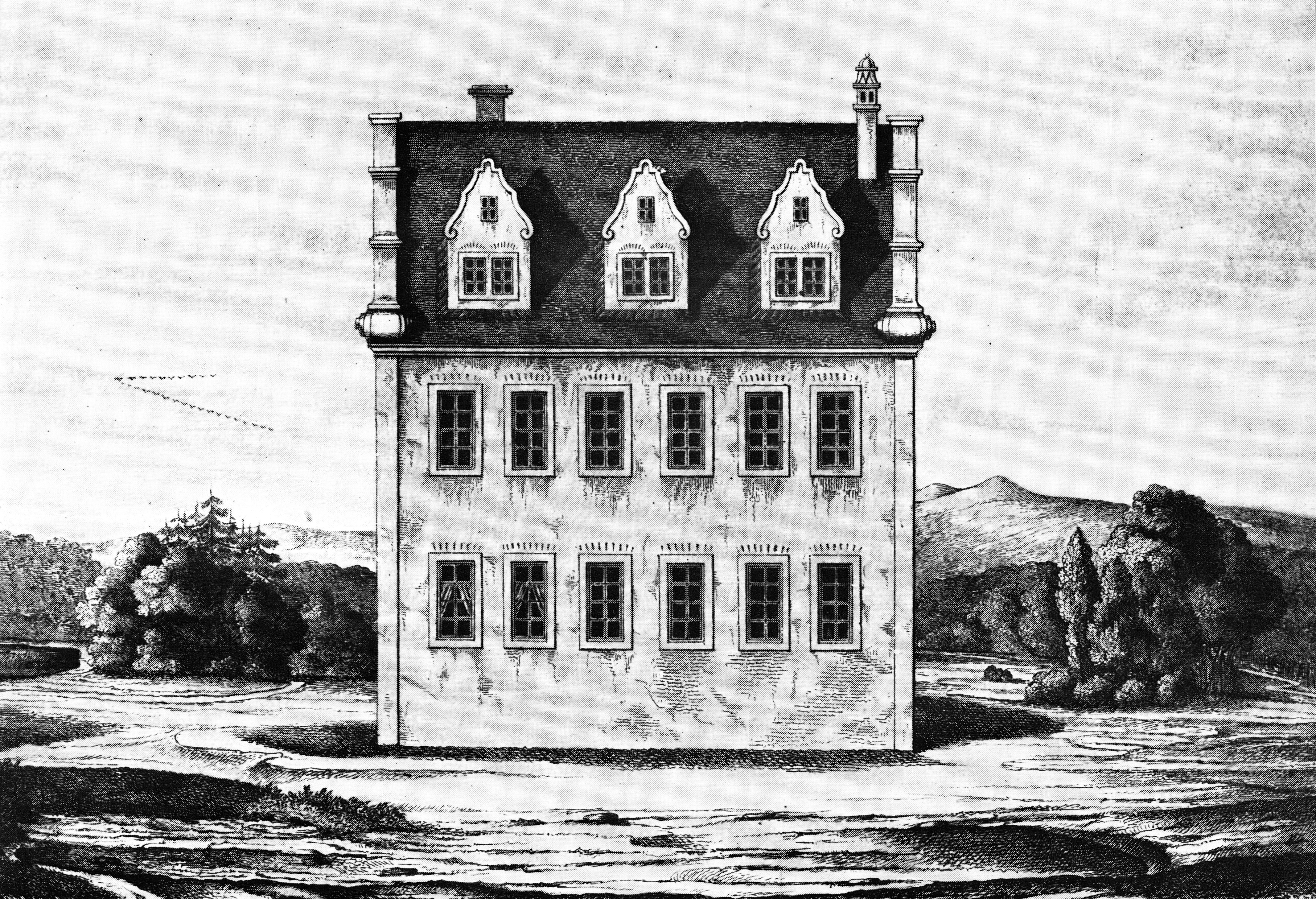 Neues Jagdschloss Jägersburg (erbaut 1713), gemalt 1851 nach alter Vorlage